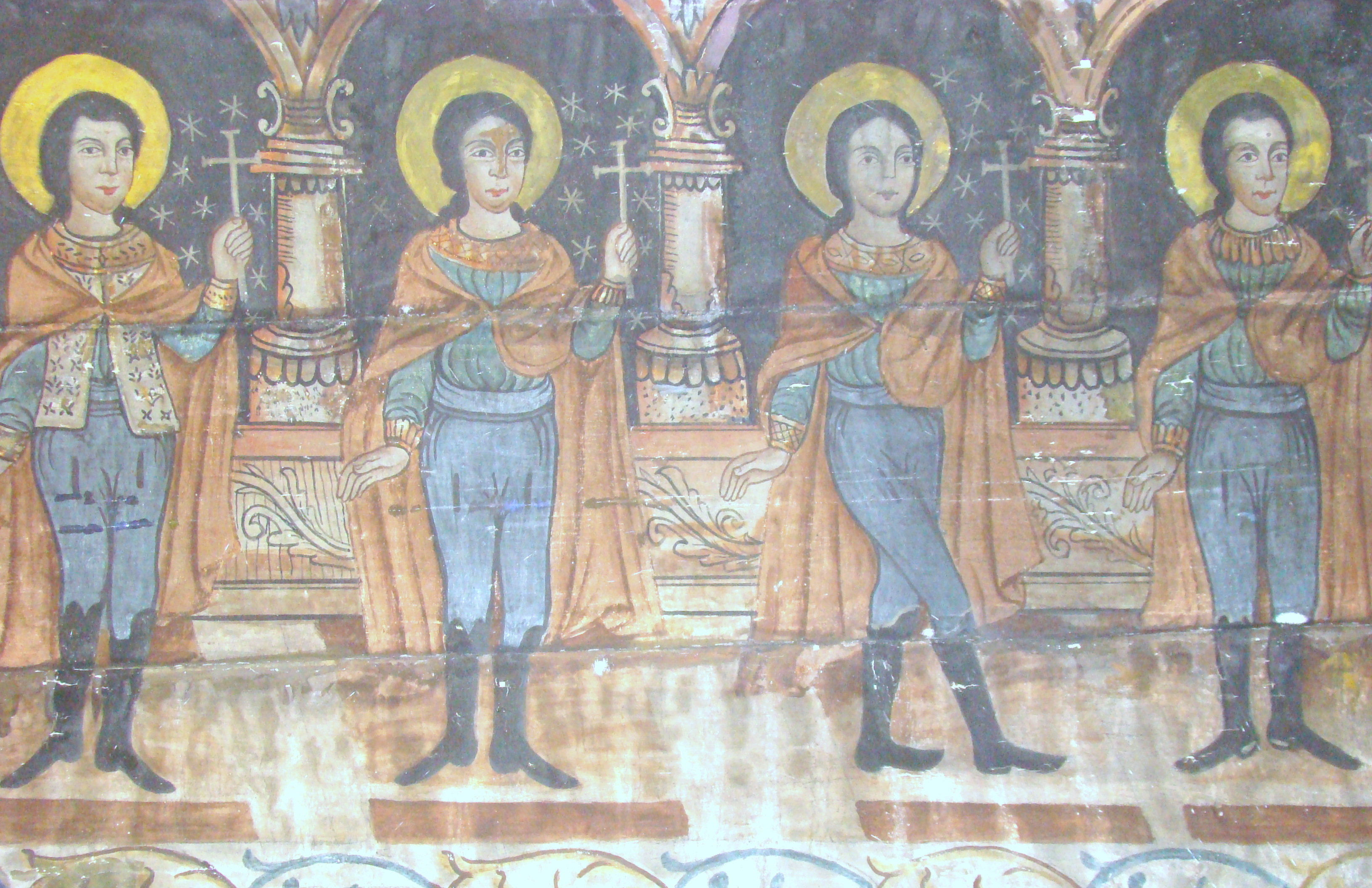 Biserica de lemn din Ticu-colonie, județul Cluj